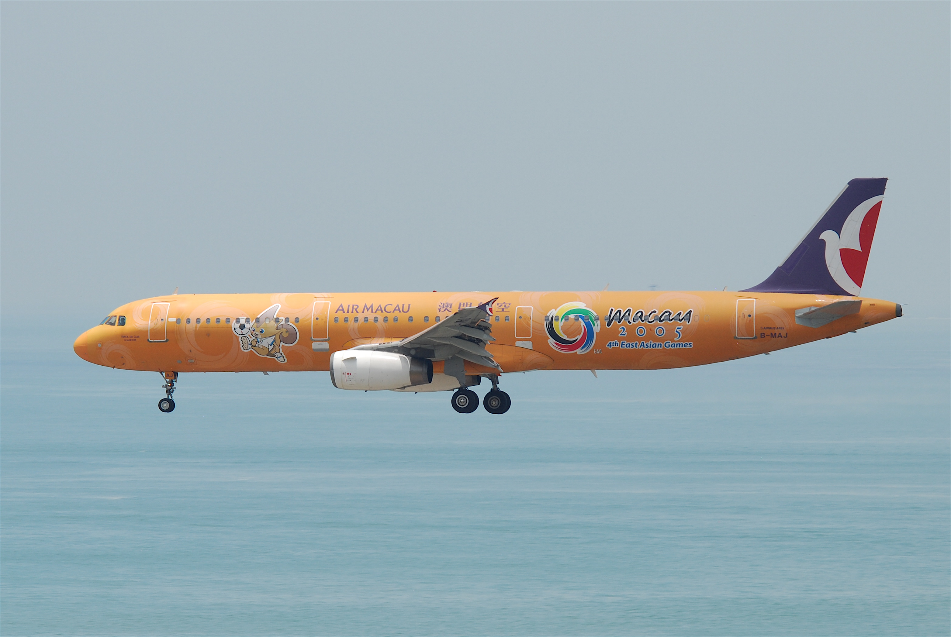 Air Macau Airbus A321-231; B-MAJ@HKG;31.07.2011614ky